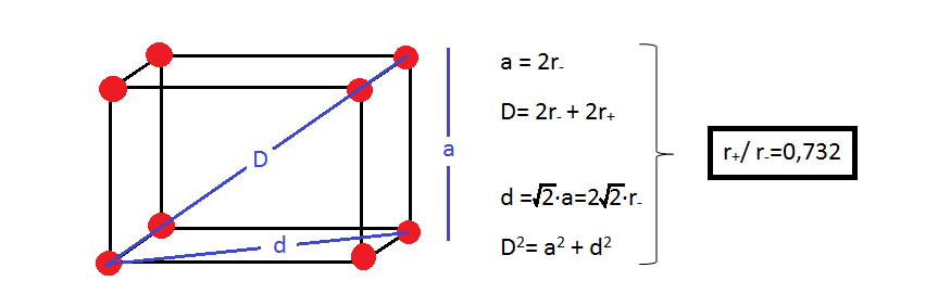 Egitura kubikoa